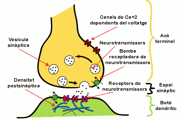 Procediment de la sinpasi